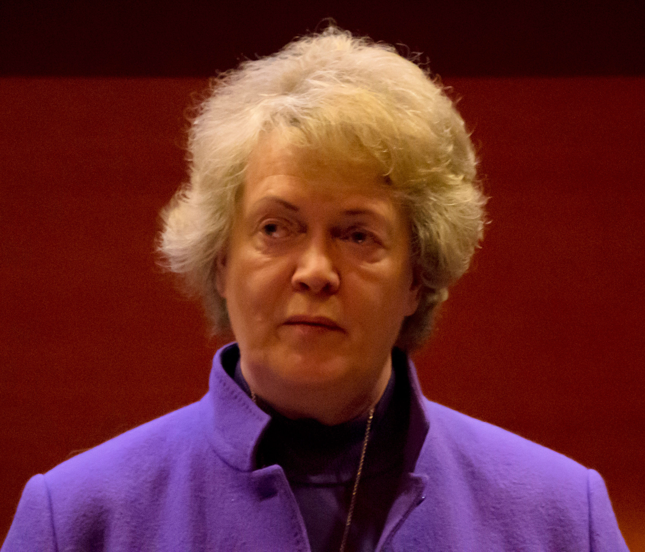 Liisa Keltikangas-Järvinen suomalainen kirjailija